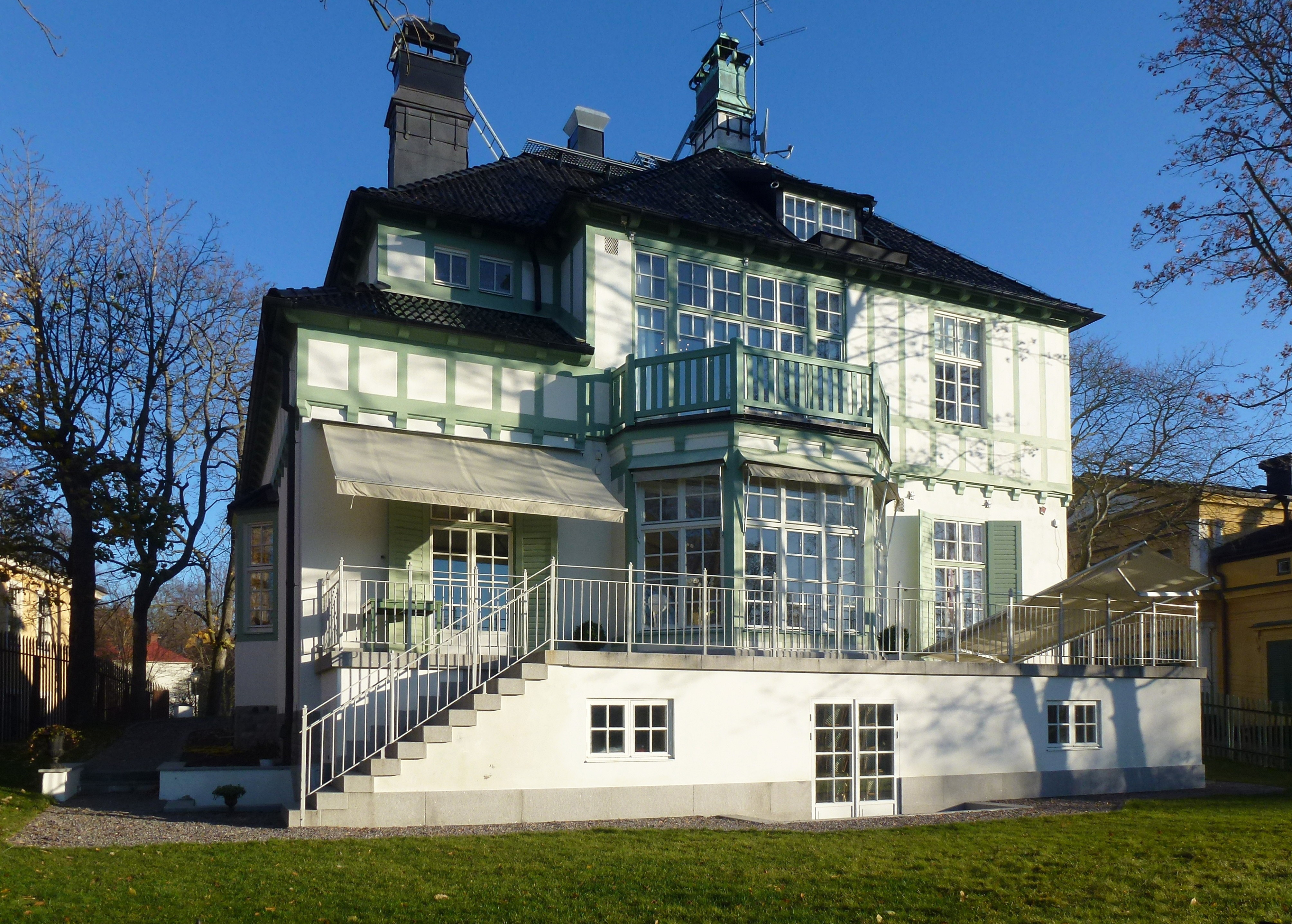 Villa Jägarbacken på Södra Djurgården